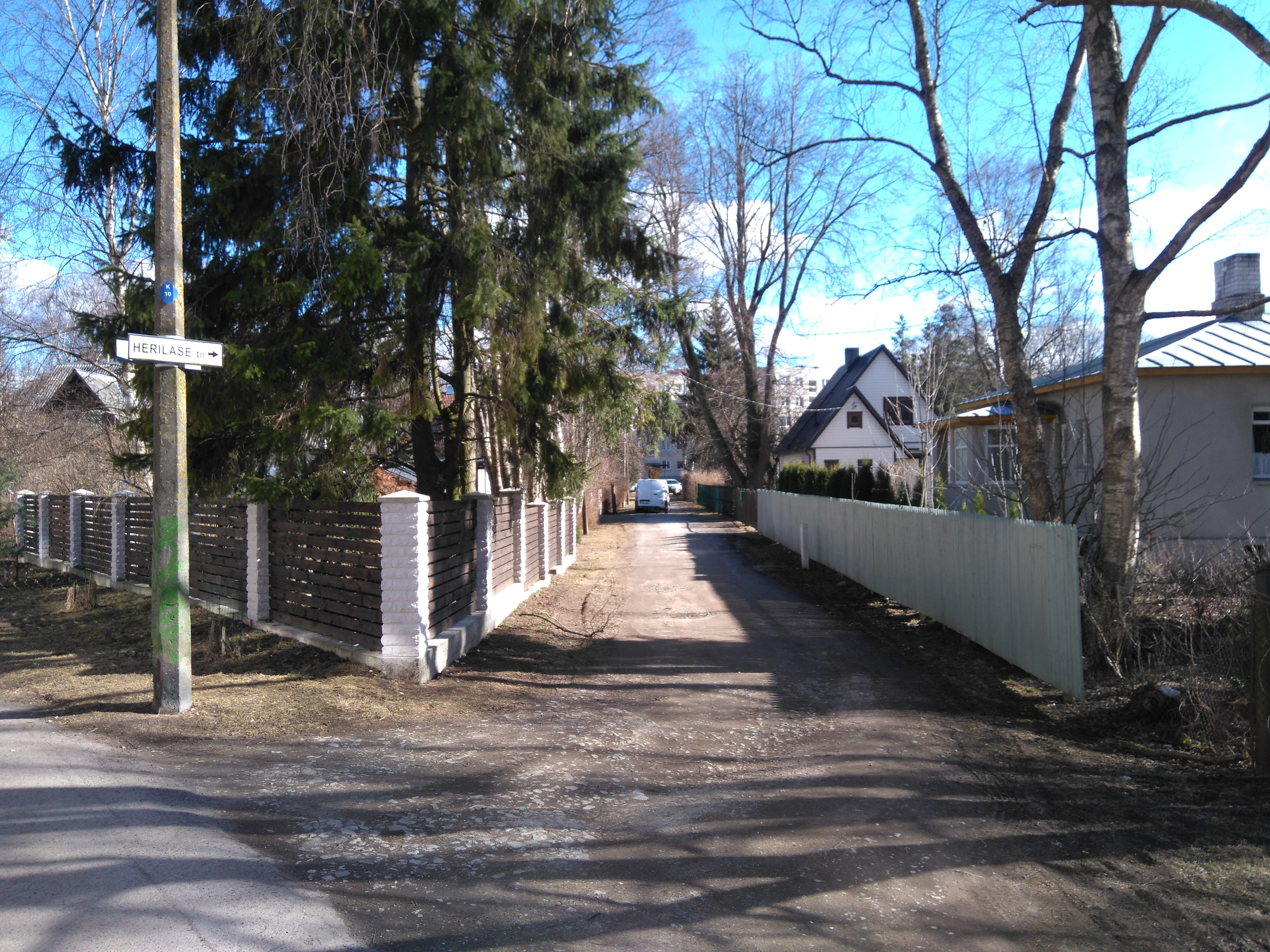 Herilase tänav Tallinnas.